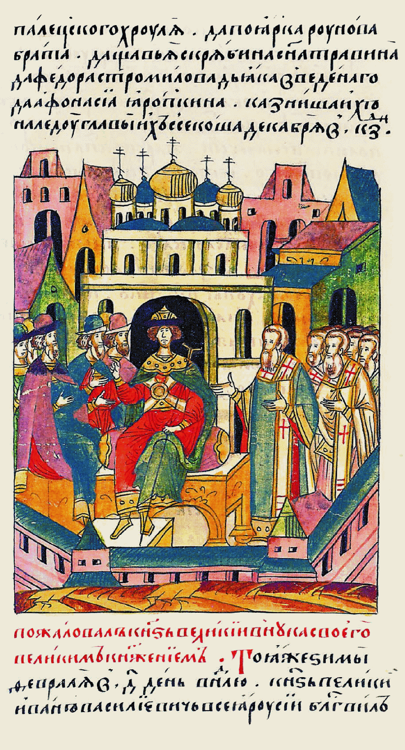 Пожаловал великий князь своего внука великим княжением. В ту же зиму февраля в 4 день в воскресенье великий князь Иван Васильевич всея Руси благословил [и посадил на великое княжение Владимир- ское и Московское и всея Руси своего внука князя Дмитрия Ивановича, а его воз- ведение на престол происходило в церкви Пречистой Богоро- дицы в Москве. По благословению Симо- на, митрополита всея Руси, архиепископа Тихона Ростовского, и епископов: Нифонта Суздальского, Вассиа- на Тверского, Прота- сия Рязанского, Авра- амия Коломенского, Евфимия Сарского и всего освященного собора возложили на него бармы Манама- ховы и шапку, и осы- пал князя его дядя князь Юрий Ивано- вич трижды золотом и серебром: перед церковью Успения Пречистой, перед церковью Архангела Михаила и перед цер- ковью Благовещения. Это произошло в 7006 году февраля в 4 день, в неделю о мытаре и фарисее.]